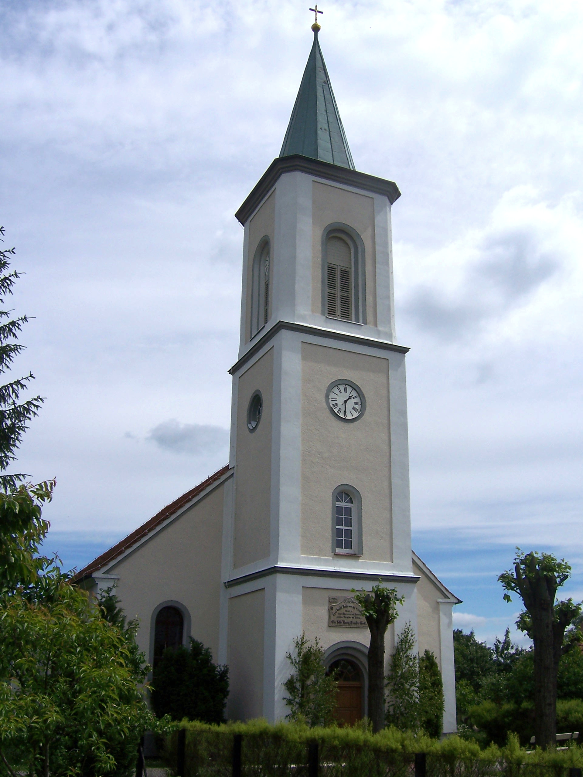 Kirche von Weigersdorf Hornjoserbsce: Wukrančanska starolutherska cyrkej.